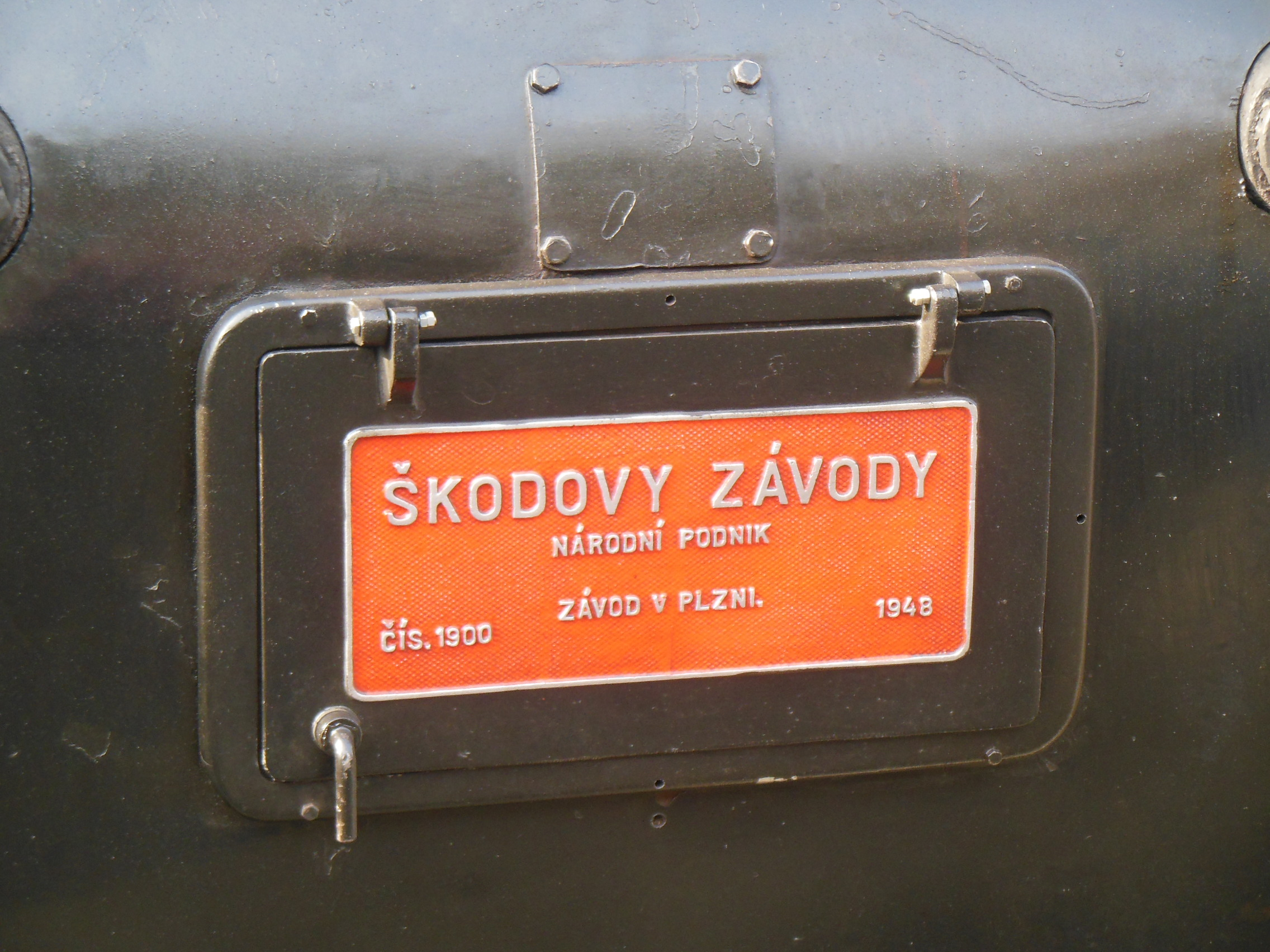 Beroun (okres Beroun). Křivoklátský expres (duben 2014), parní lokomotiva 475.179 v železniční stanici Beroun.